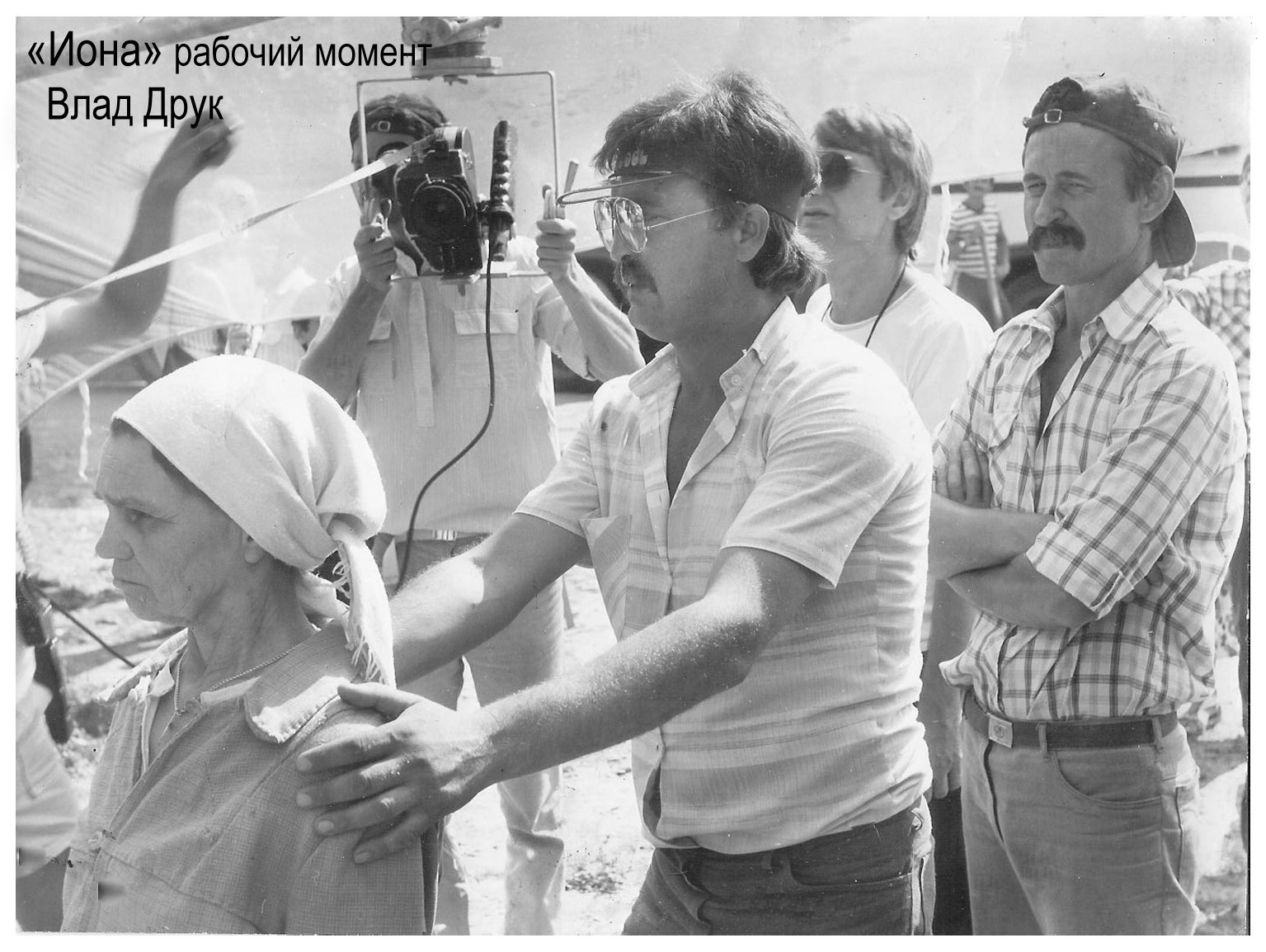 În timpul filmărilor filmului Iona